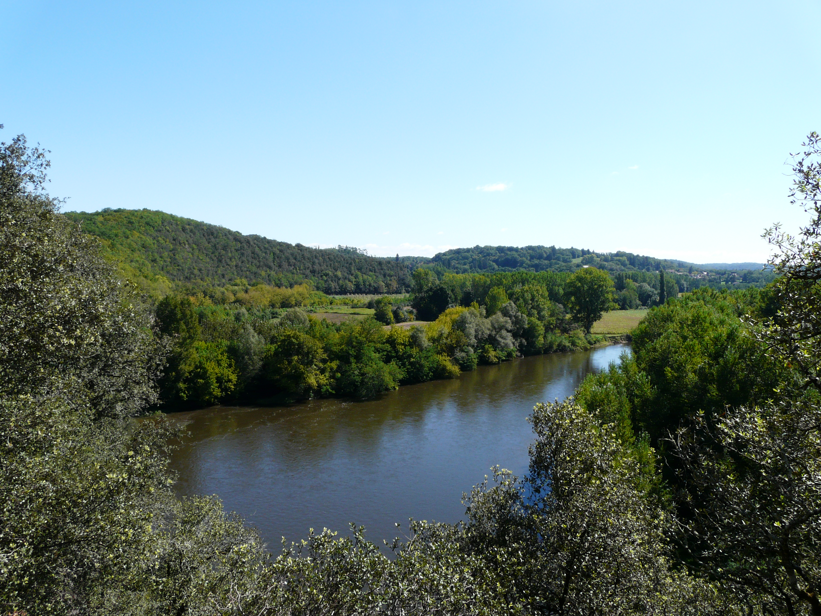 La Dordogne au cingle de Montfort, vue depuis le belvédère de la route départementale 703 ; Carsac-Aillac, Dordogne, France.